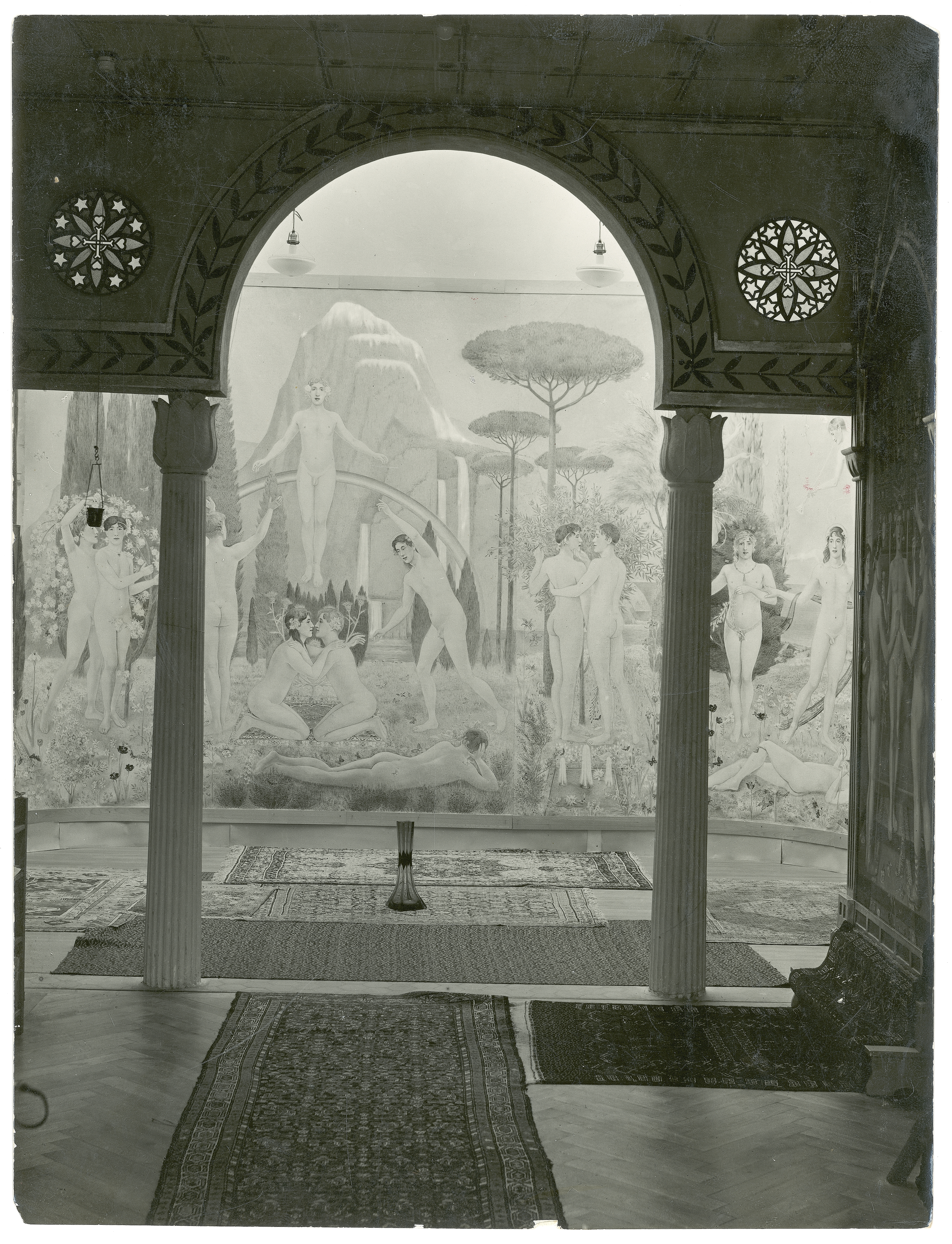 Veduta dell'interno del Sanctuarium Artis Elisarion Minusio (Aula) (1939)